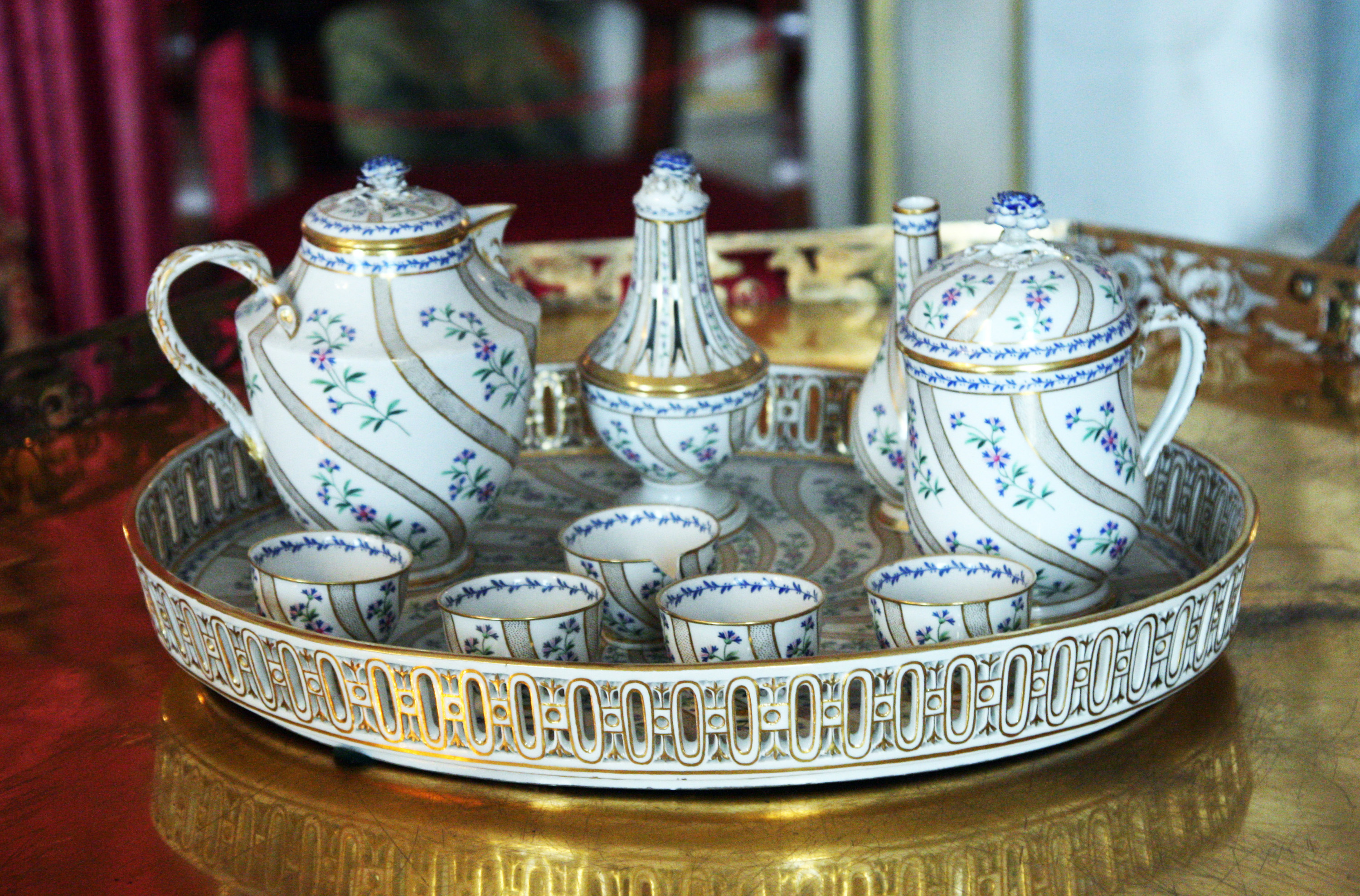 Meissner Porzelan (1810-1820) im Inventar des Schlafzimmers von Königin Charlotte Mathilde im Residenzschloss Ludwigsburg. Ursprünglich 11-teilig, wurden Teile nach und nach gestohlen und ist heute zum Schutz vor Gelegenheitsdieben fest angeklebt.